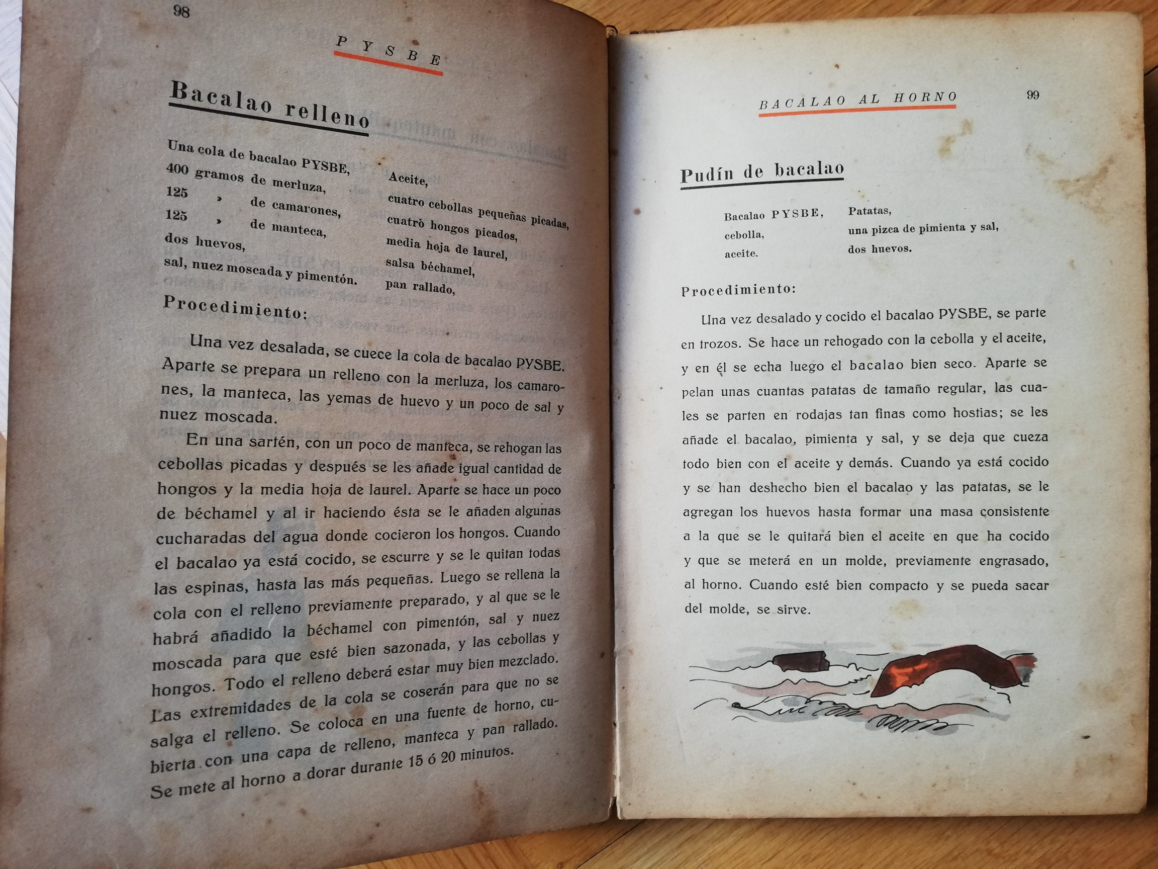 PYSBE enpresa 1936an errezeta liburu hau argitaratu zuen.